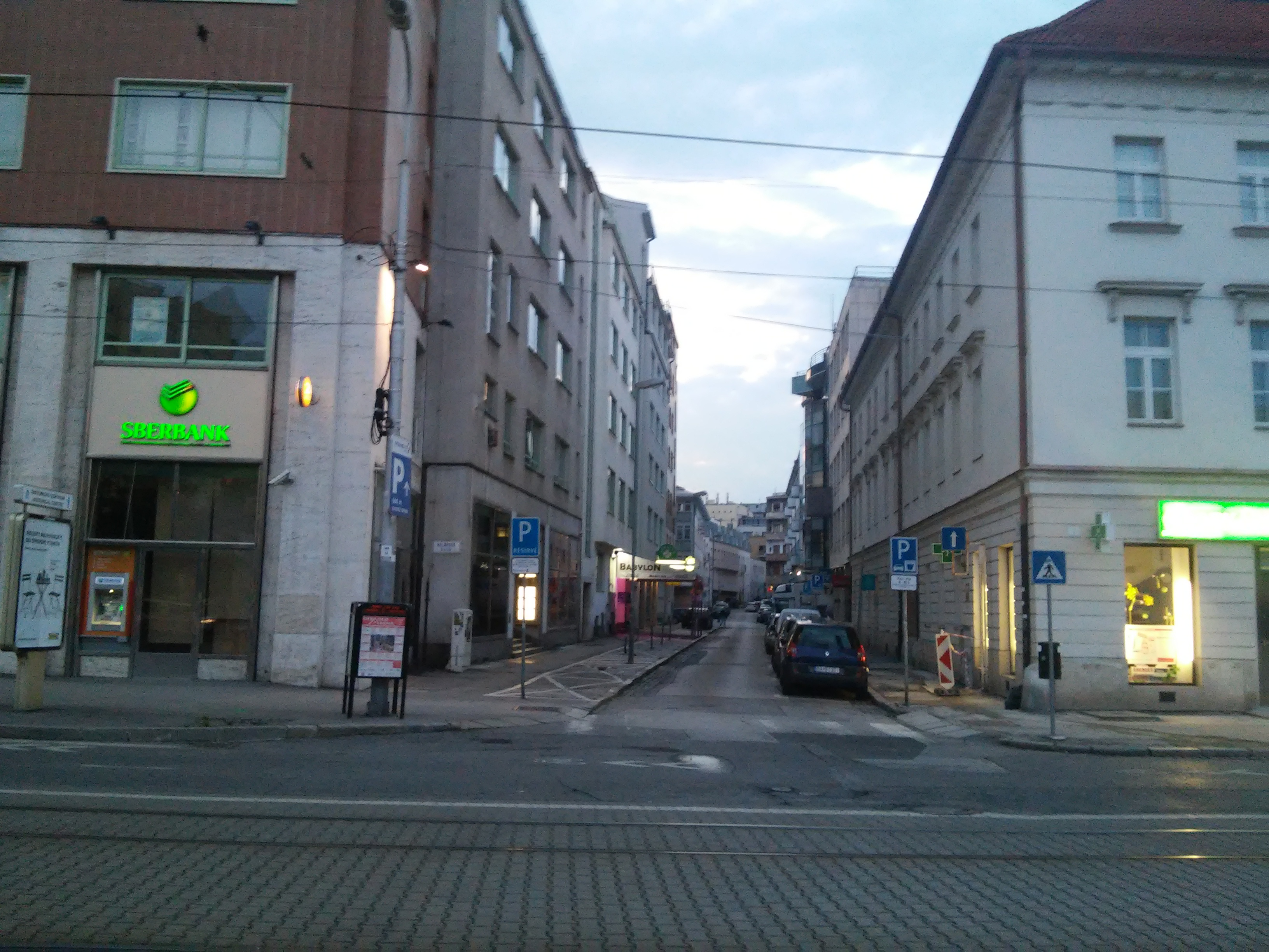 Kolárska, Bratislava